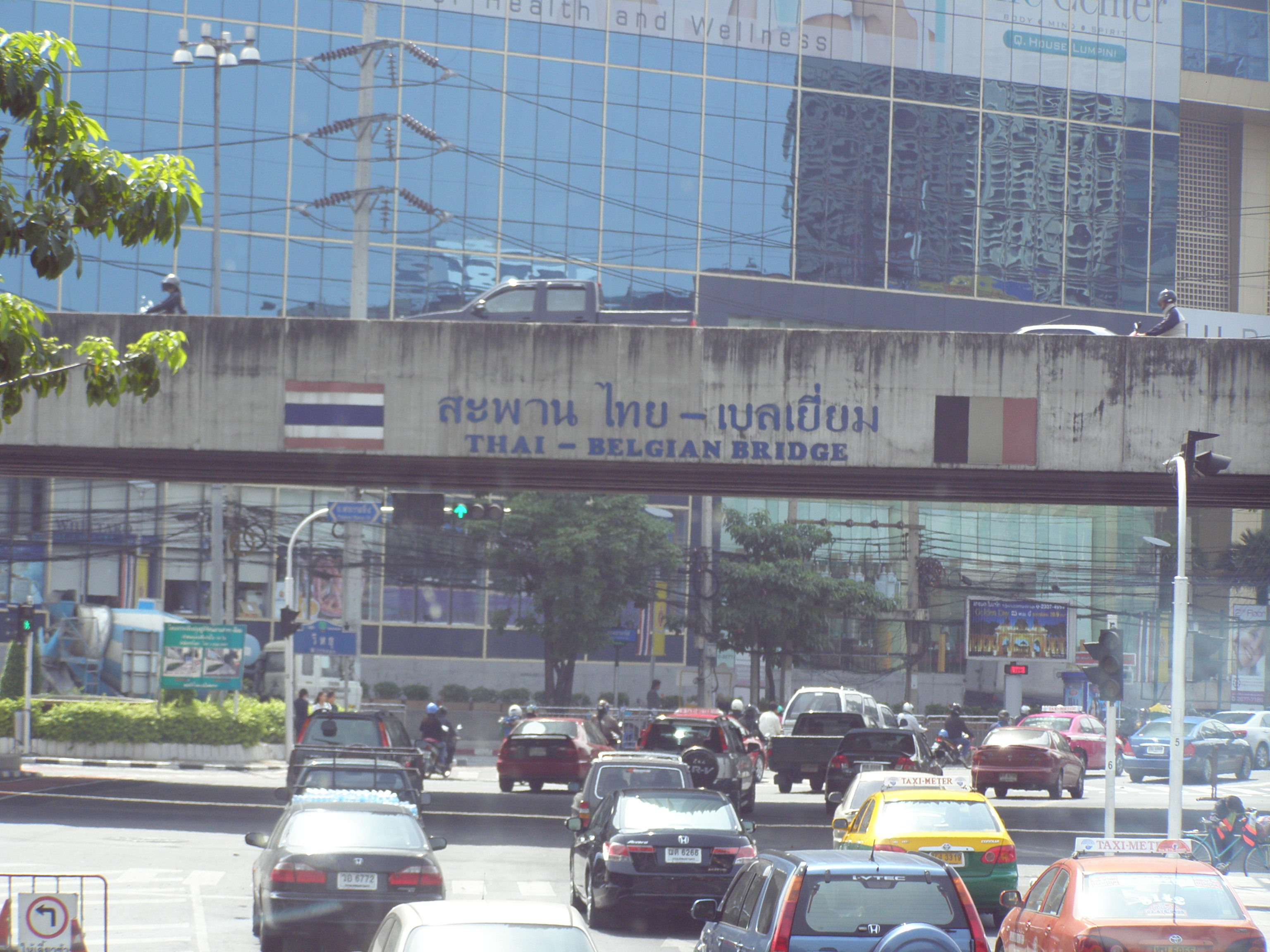 View Bridge Bangkok By HS3CMI